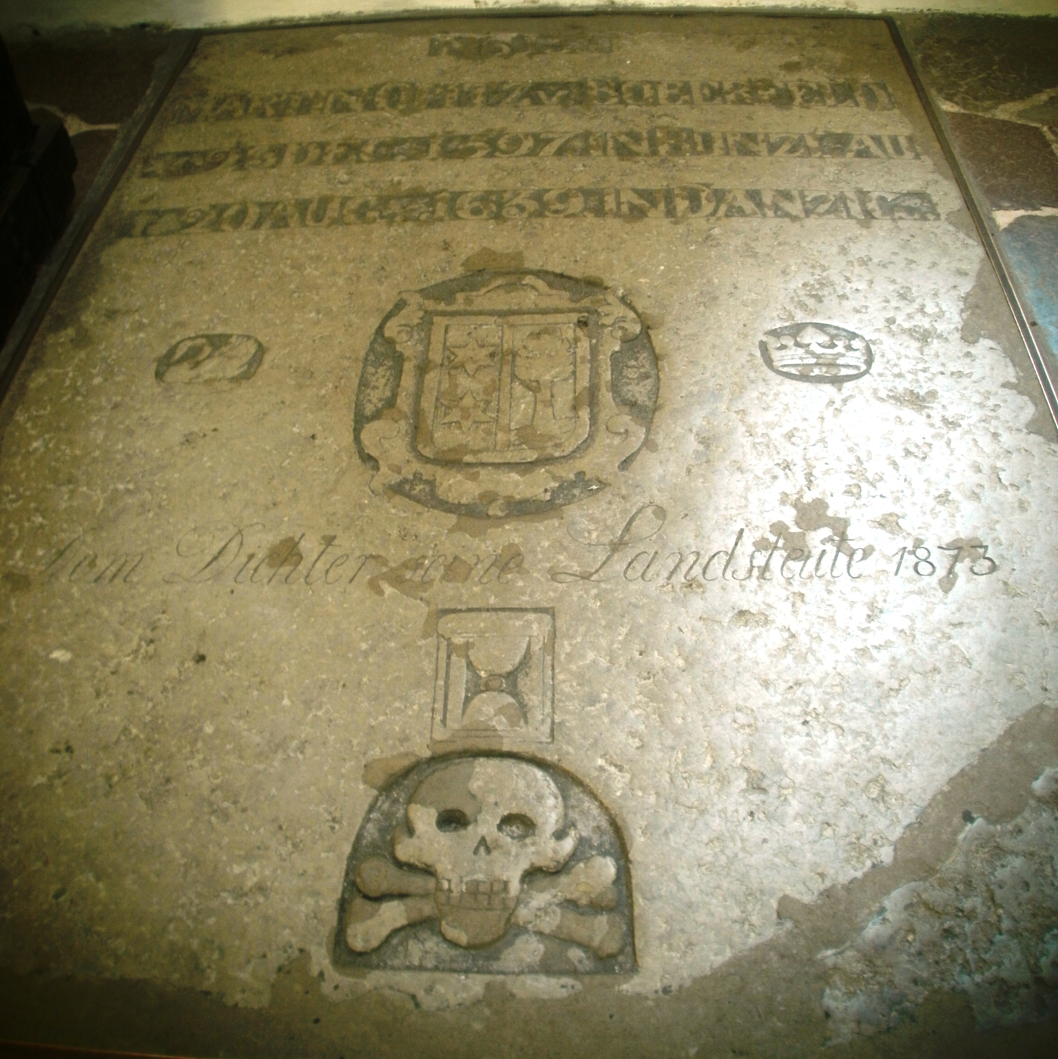 Gdańsk, kościół par. p.w. Wniebowzięcia NMP, tzw. Mariacki, 1343, 1502, po 1945